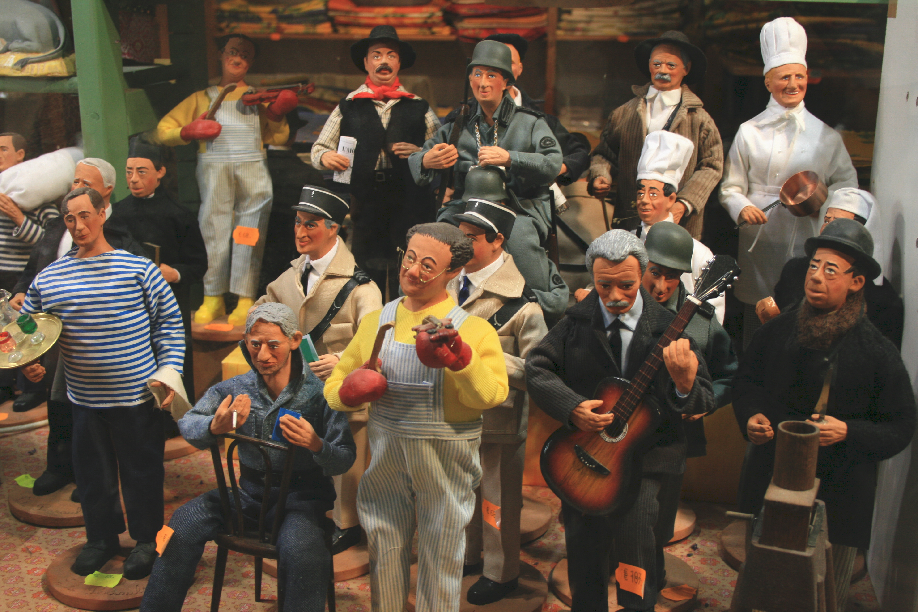 Santons représentant des célébrités françaises parmi lesquelles : L'humoriste Coluche, jouant du violon avec des gants de boxe (deux fois) L'acteur et chanteur Fernandel, dans Don Camillo et La Cuisine au beurre Le chanteur Georges Brassens L'acteur Bourvil, dans La Cuisine au beurre et La Grande Vadrouille L'acteur Louis de Funès, dans Le Gendarme de Saint-Tropez et La Grande Vadrouille (deux fois) L'acteur Michel Galabru, dans Le Gendarme de Saint-Tropez Le chanteur Serge Gainsbourg